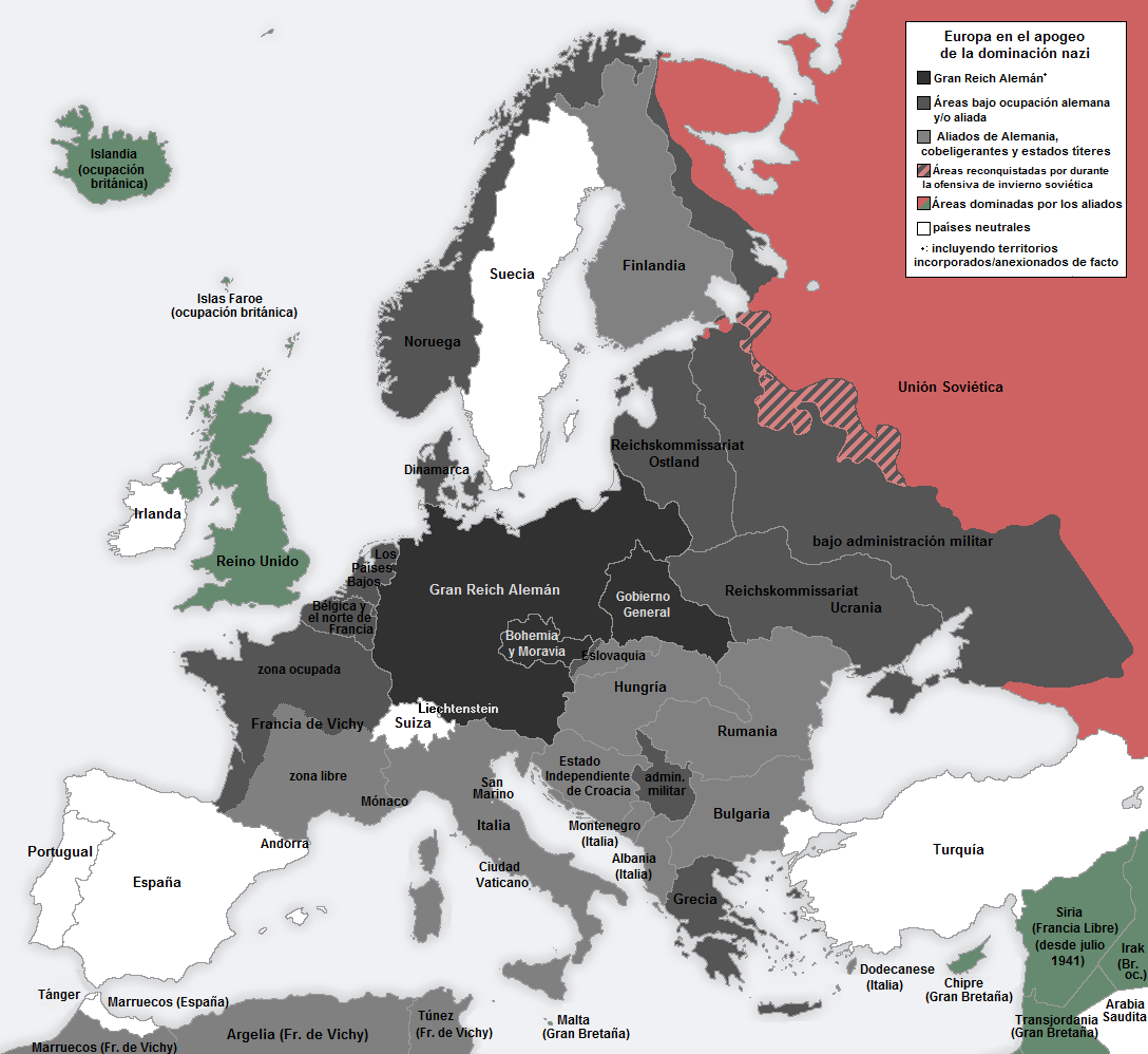 Un mapa de Europa bajo ocupación alemana nazi.